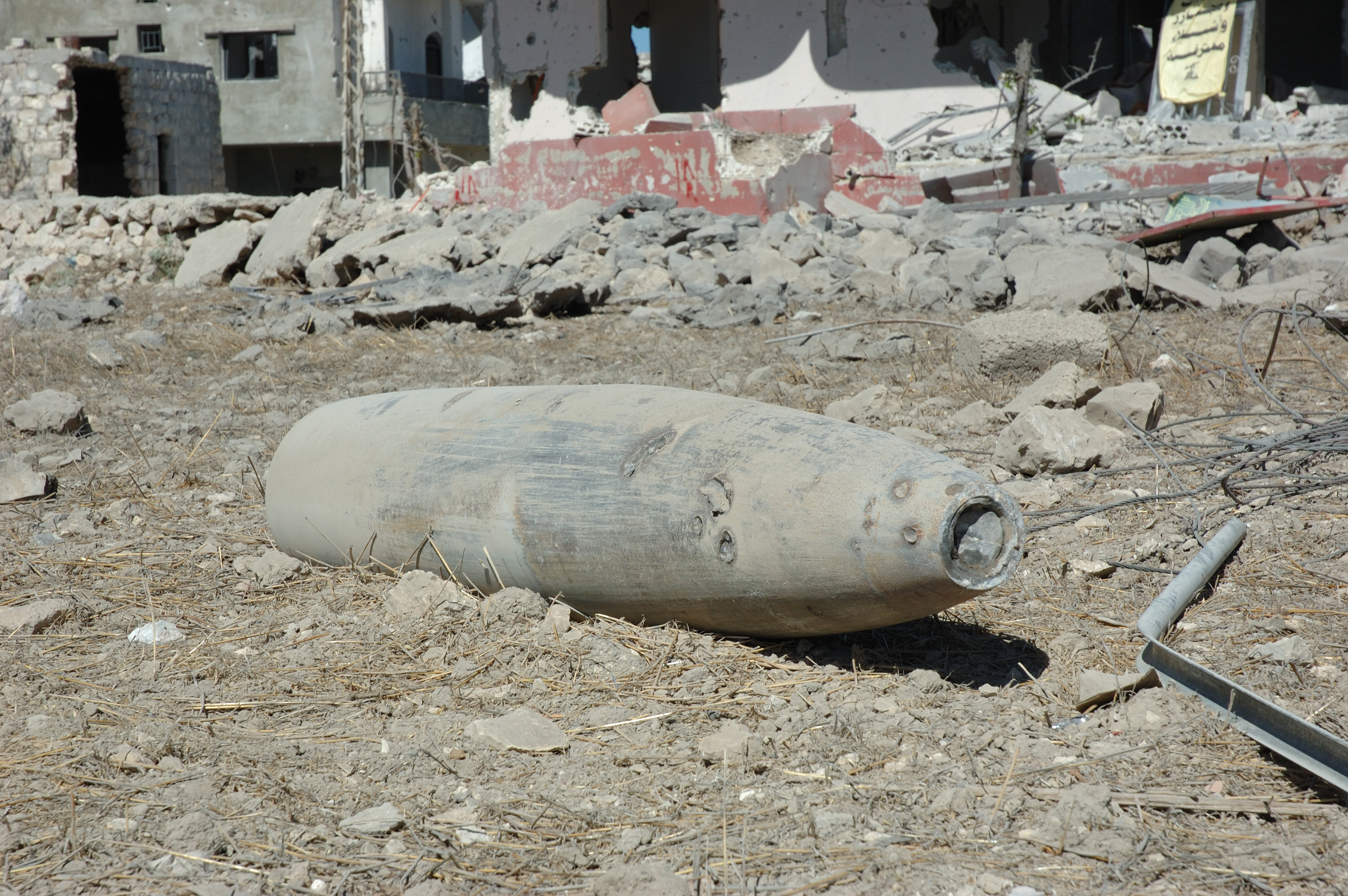 About 1.5m long